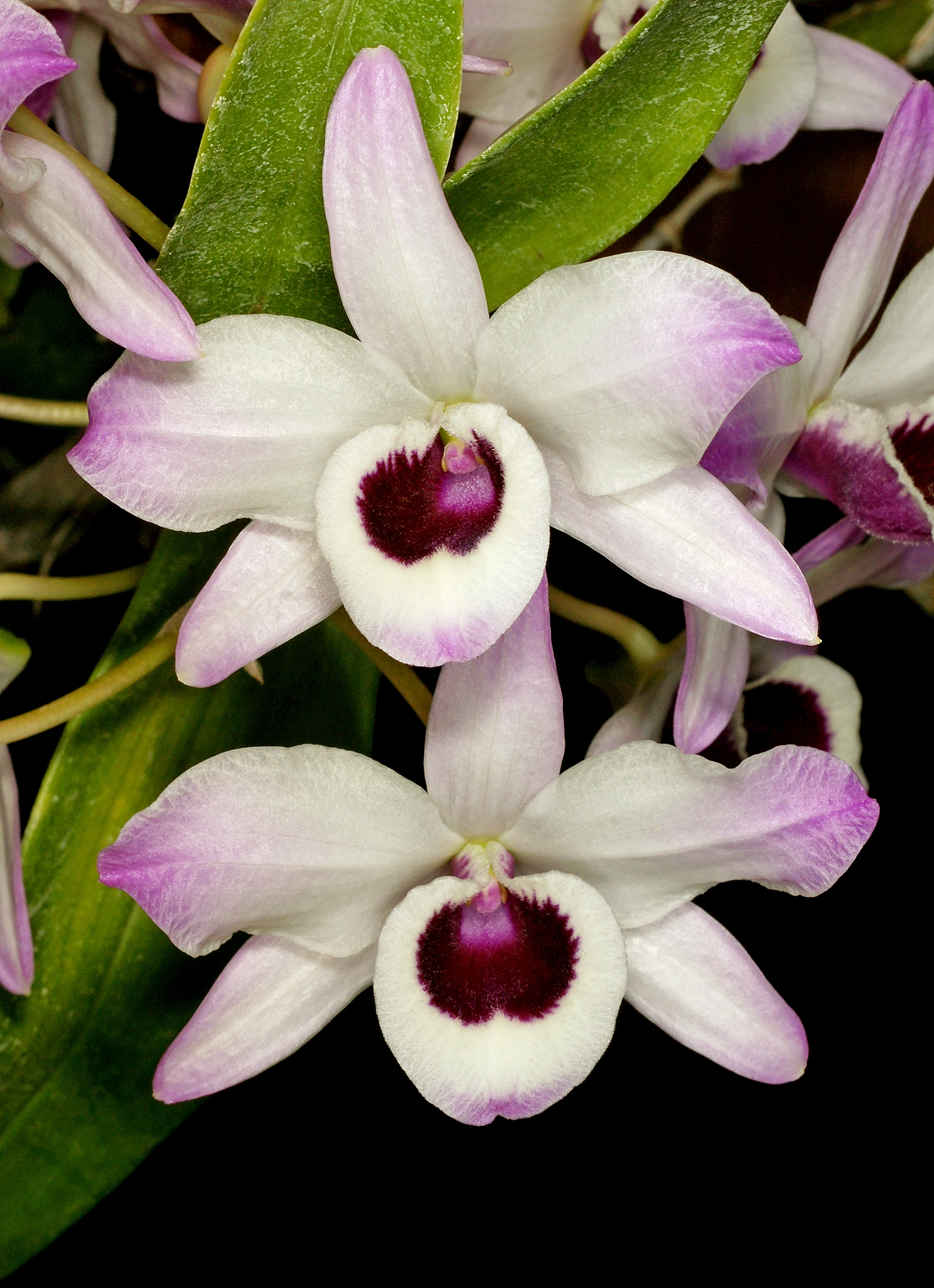 Dendrobium nobile